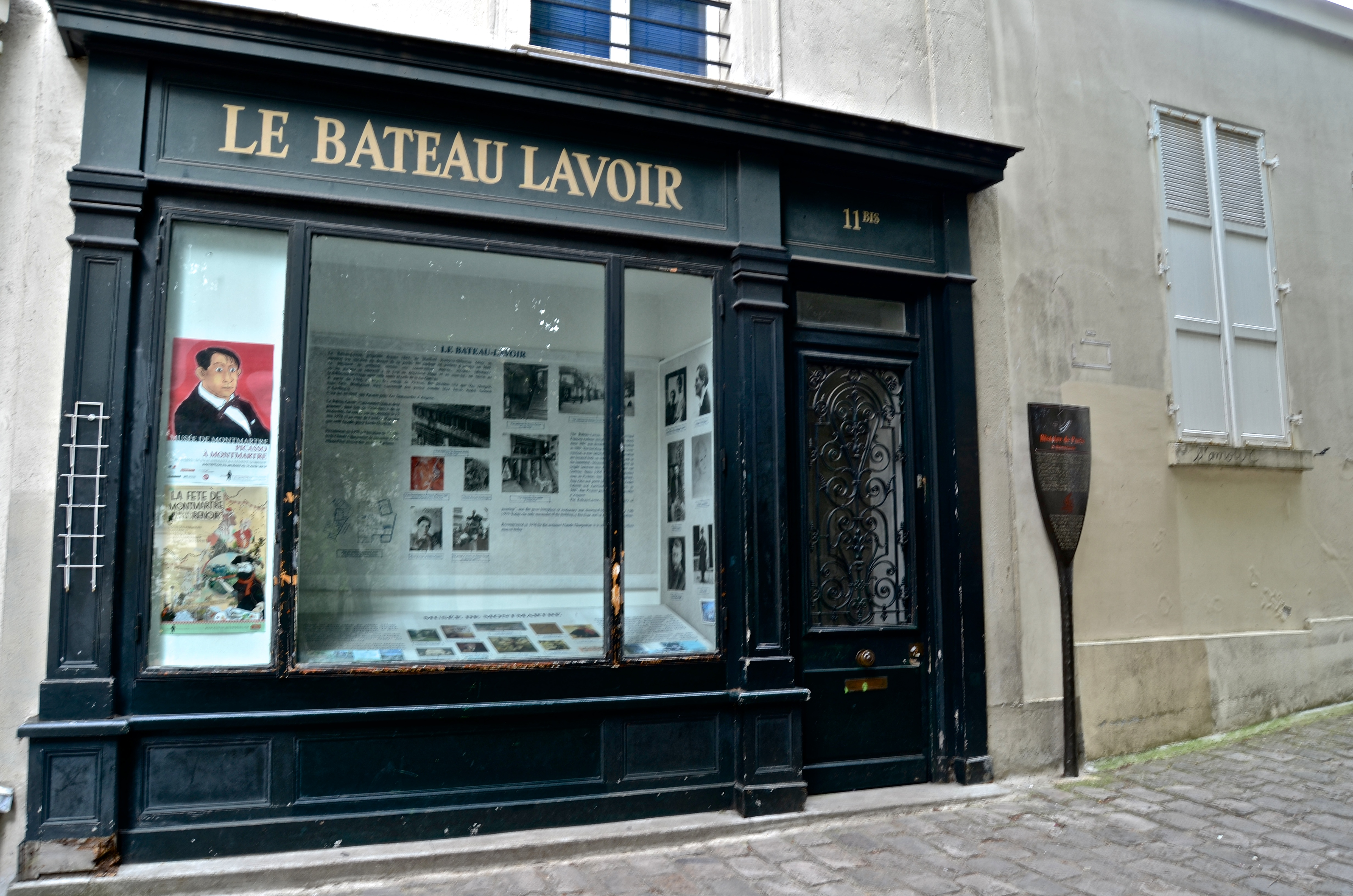 Cette photo ne représente pas le Bateau-Lavoir mais un bâtiment agrémenté d'une vitrine dédiée à l'histoire de celui-ci et située 11 bis place Émile-Goudeau, à gauche de la cité d'artistes